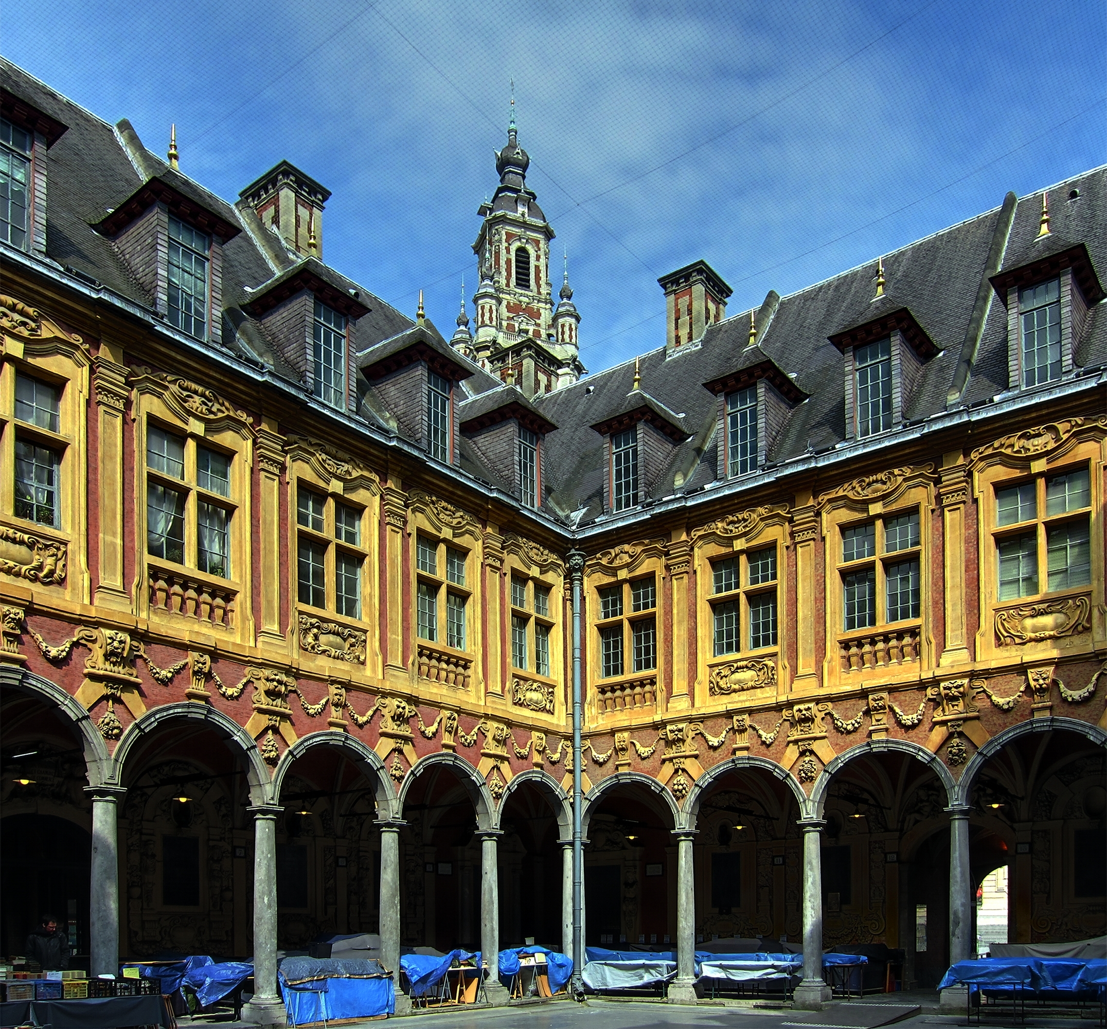 Intérieur de la vieille bourse de Lille.